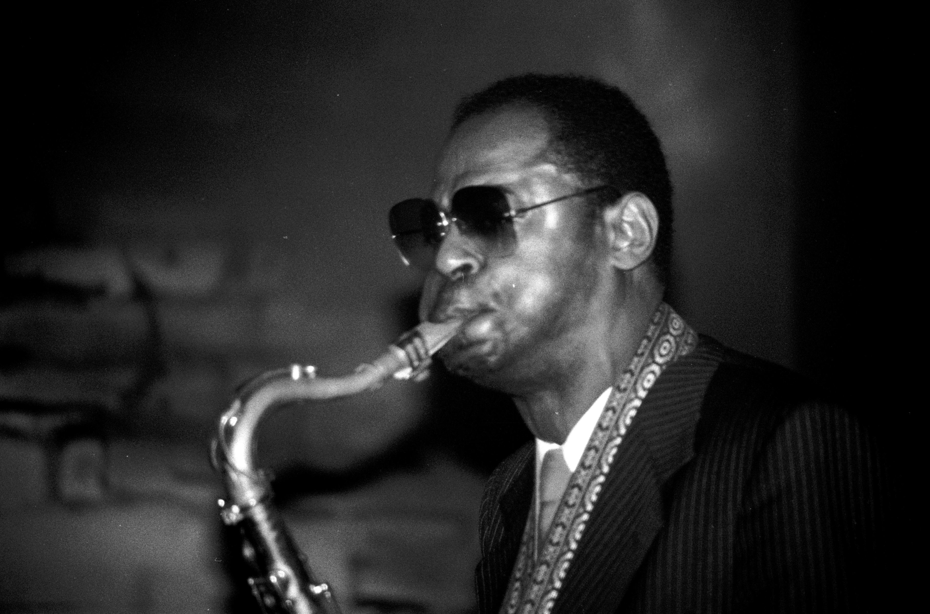 Le saxophoniste américain Archie Shepp en concert à Plougonven (Bretagne, France) en 1982.